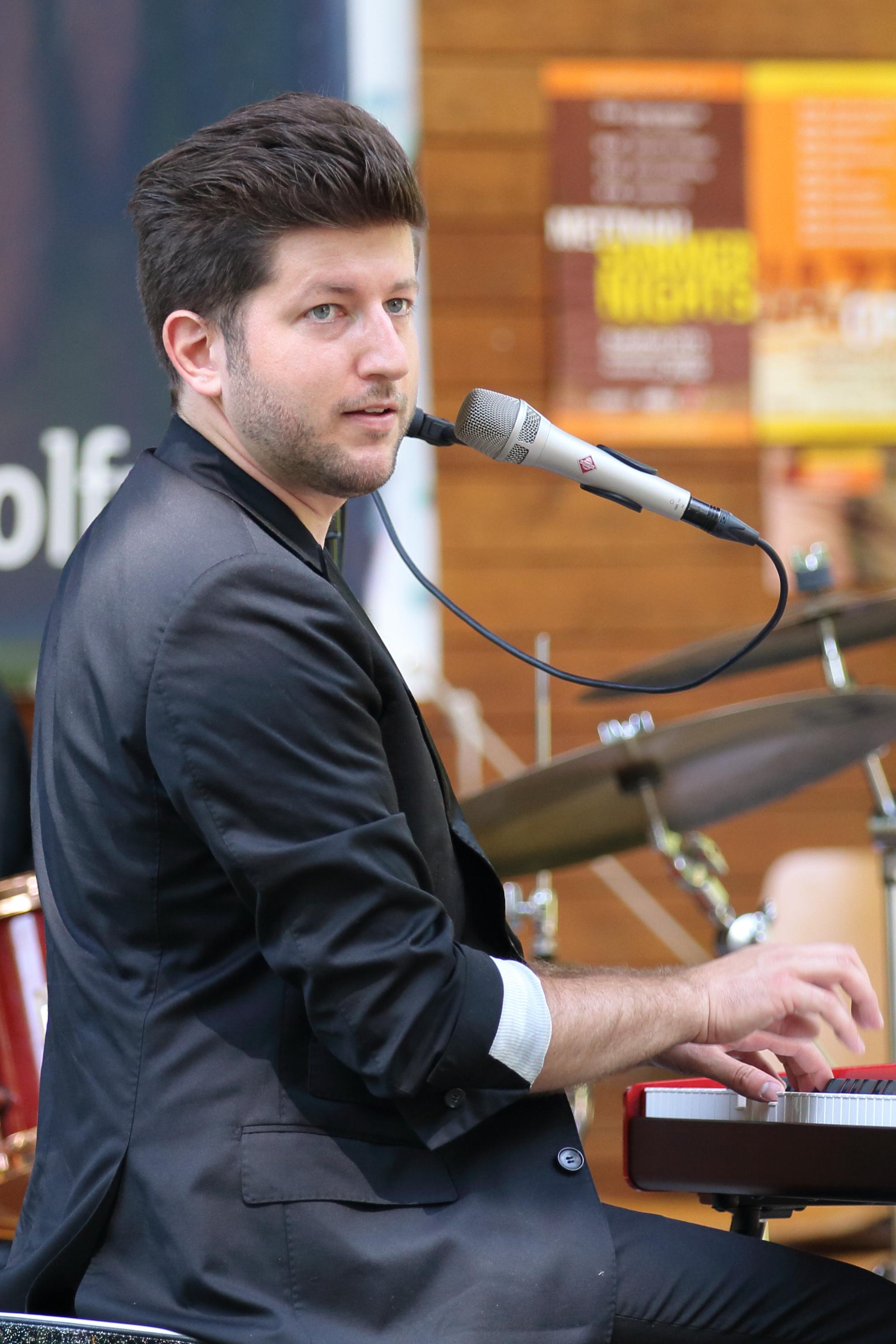 Gordon November. Aufgenommen am 14.6.2015 bei einem Konzert in Radolfzell am Bodensee/Mettnau, Deutschland.